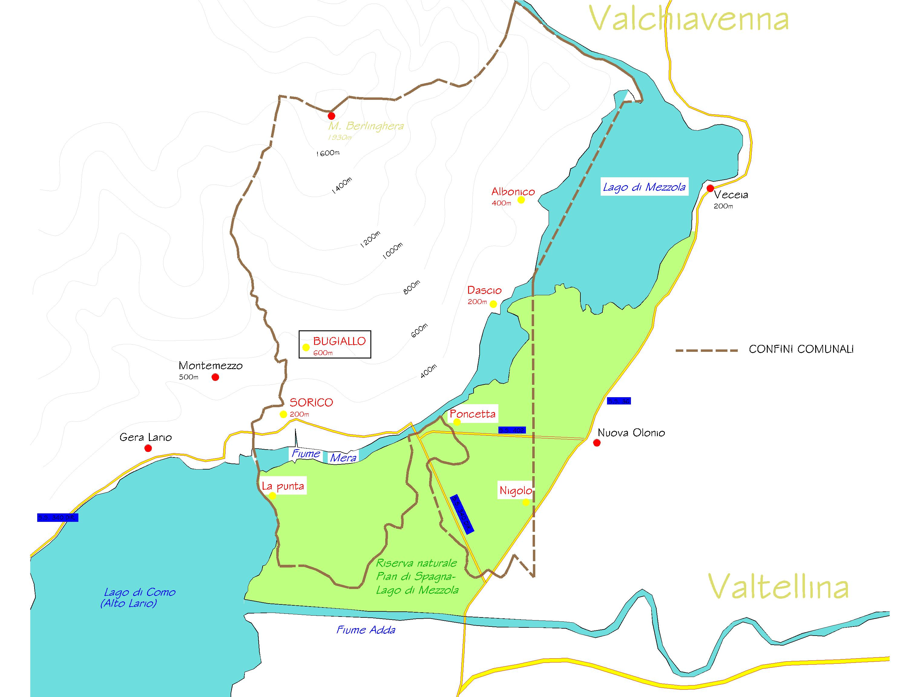 Posizione di Bugiallo nel comune di Sorico